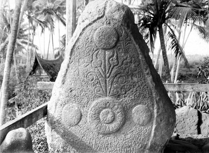 Negatief. Door Minangkabau bewerkte staande leisteen